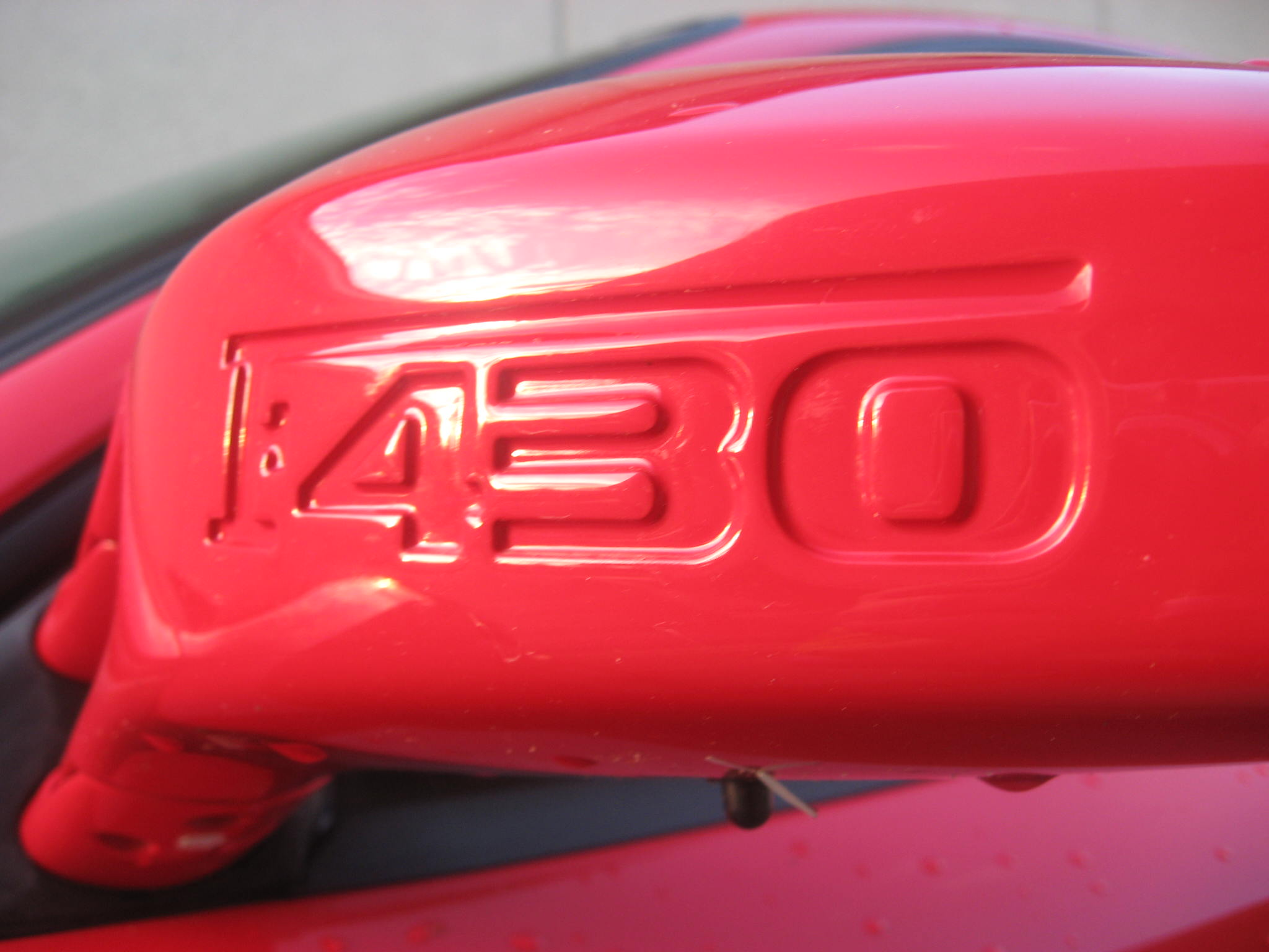 Ferrari F430 Side Mirror.